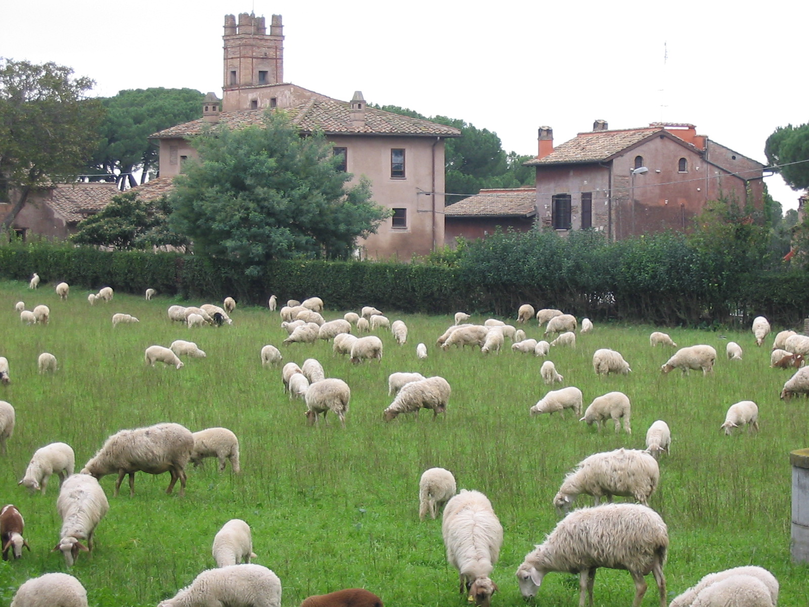 Les abords de la Via Appia, octobre 2004. Je suis l'auteur du cliché